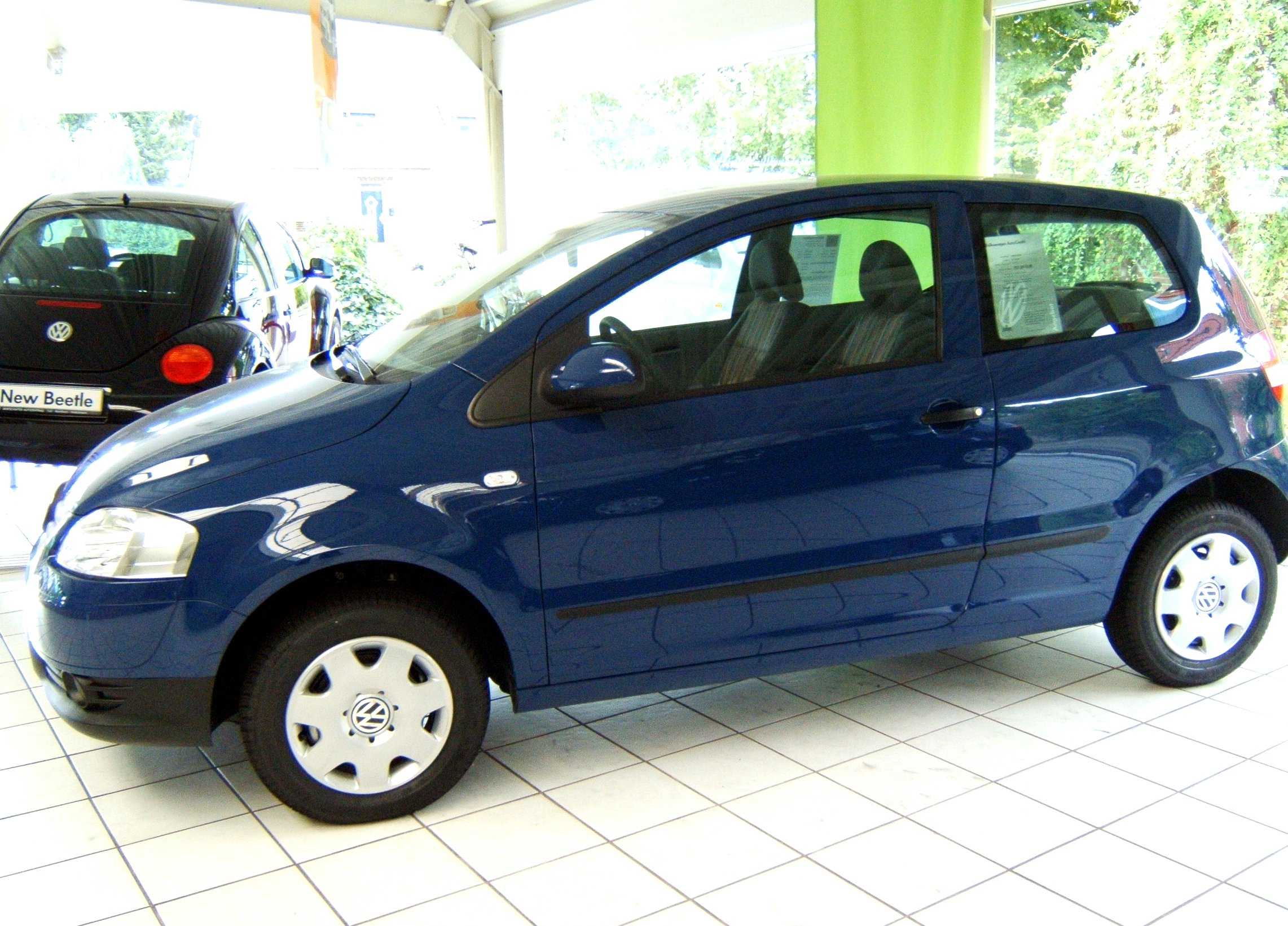 Volkswagen Fox